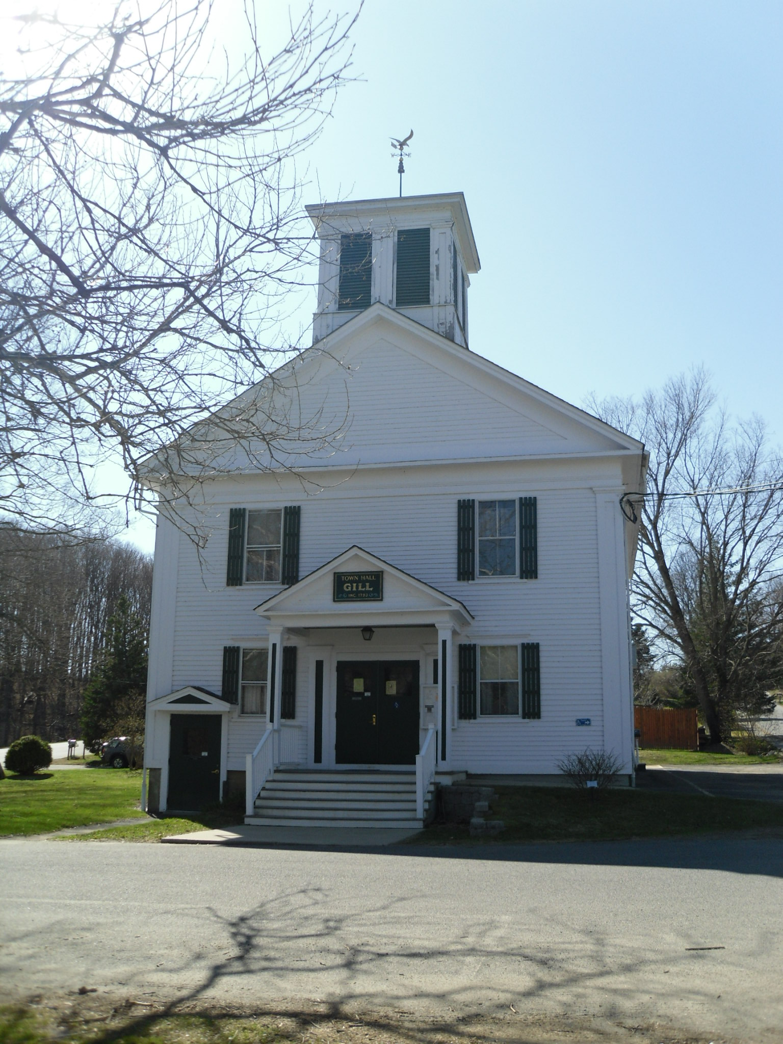 Gill, Massachusetts